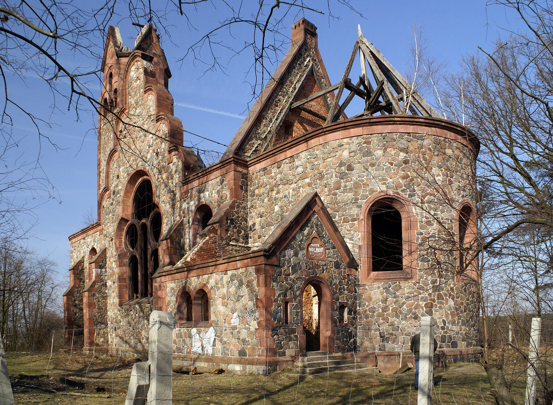 Pisarzowice, kościół ewangelicki, 1902